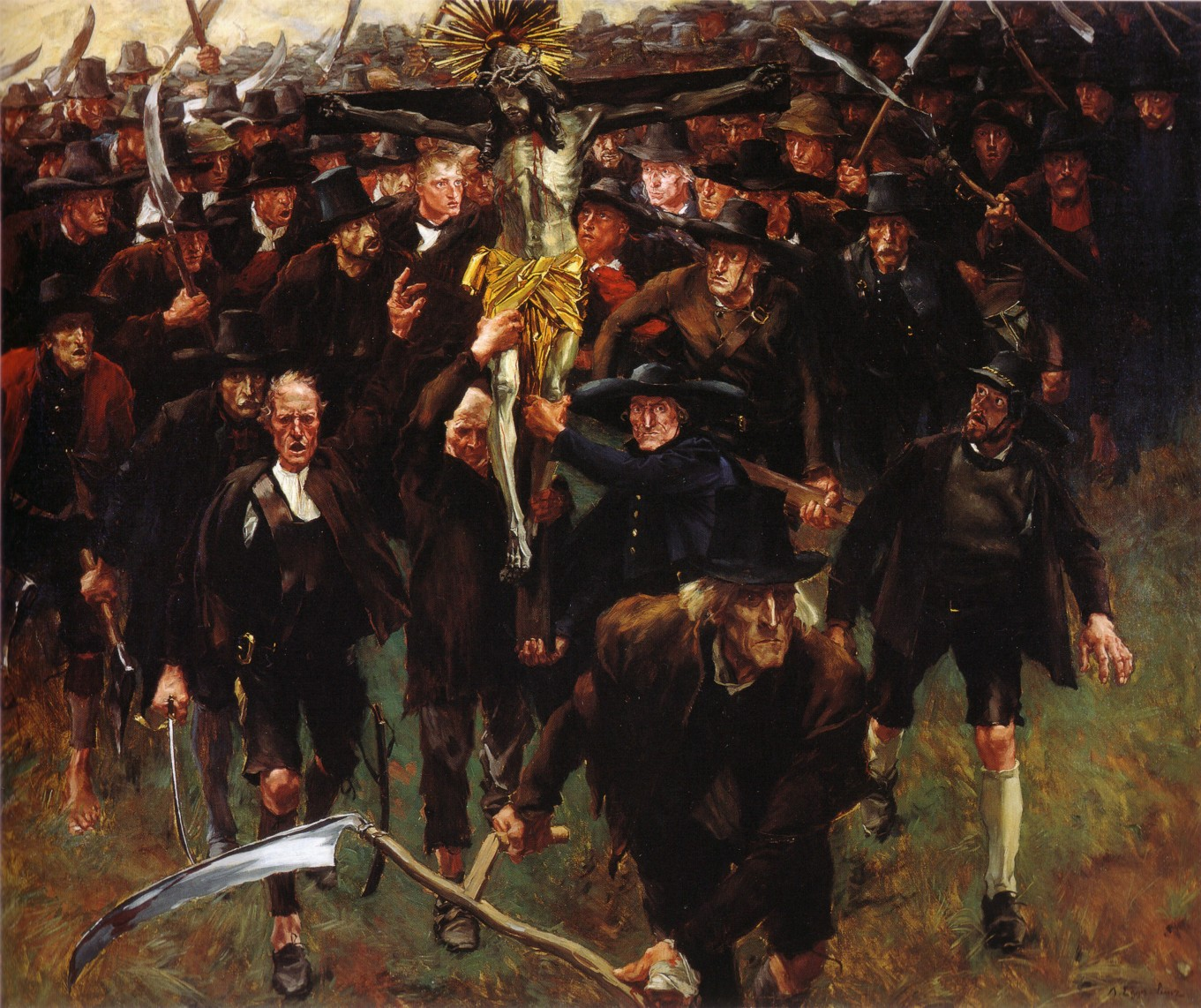 Das Kreuz